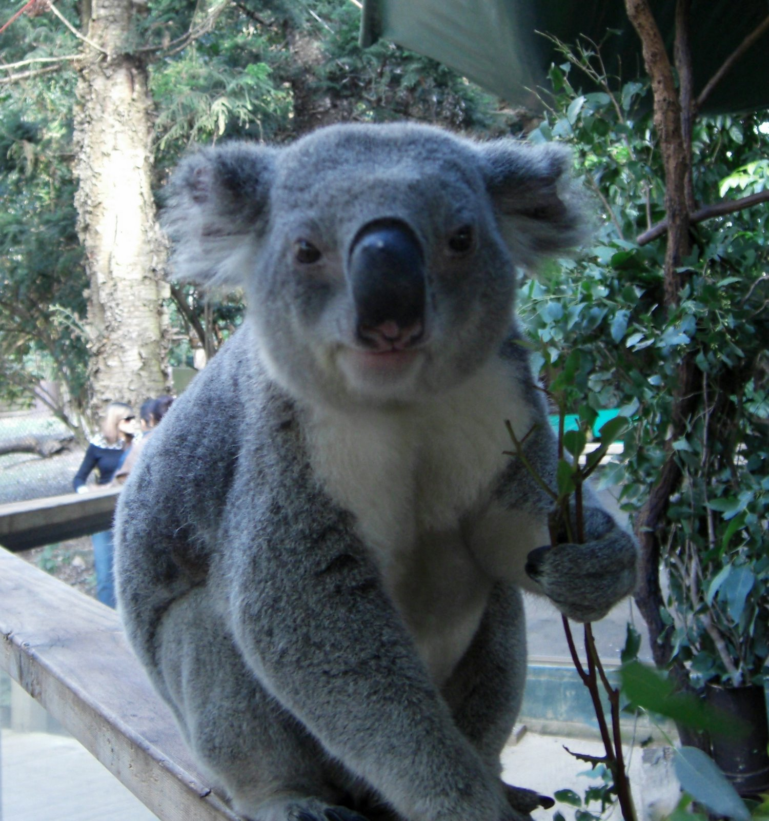 Koala